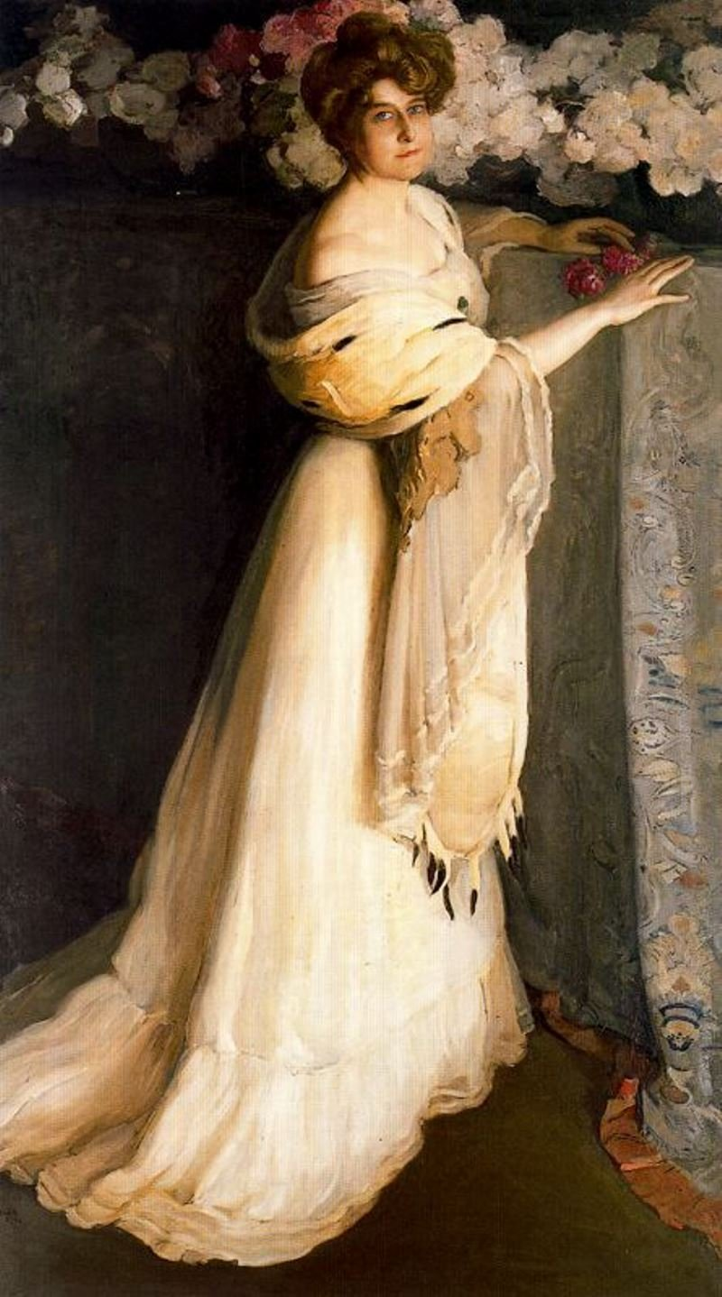 Эрнест Билер (1863-1948)